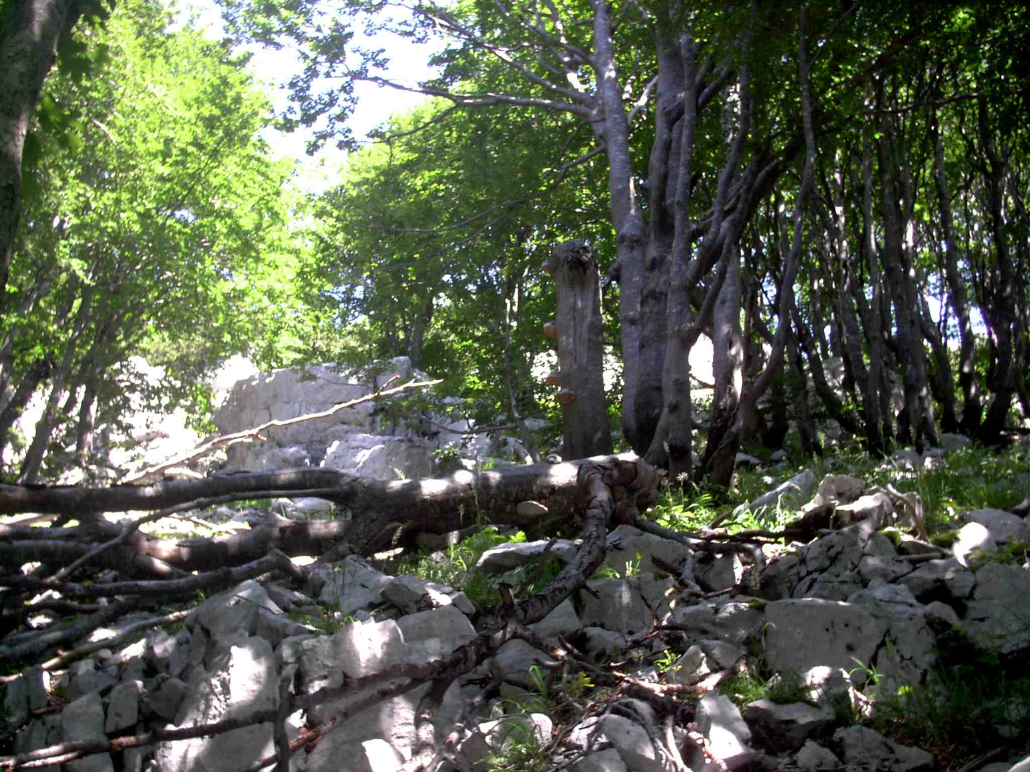 Grüner Karst in der Region Gorski Kotar, Kroatien